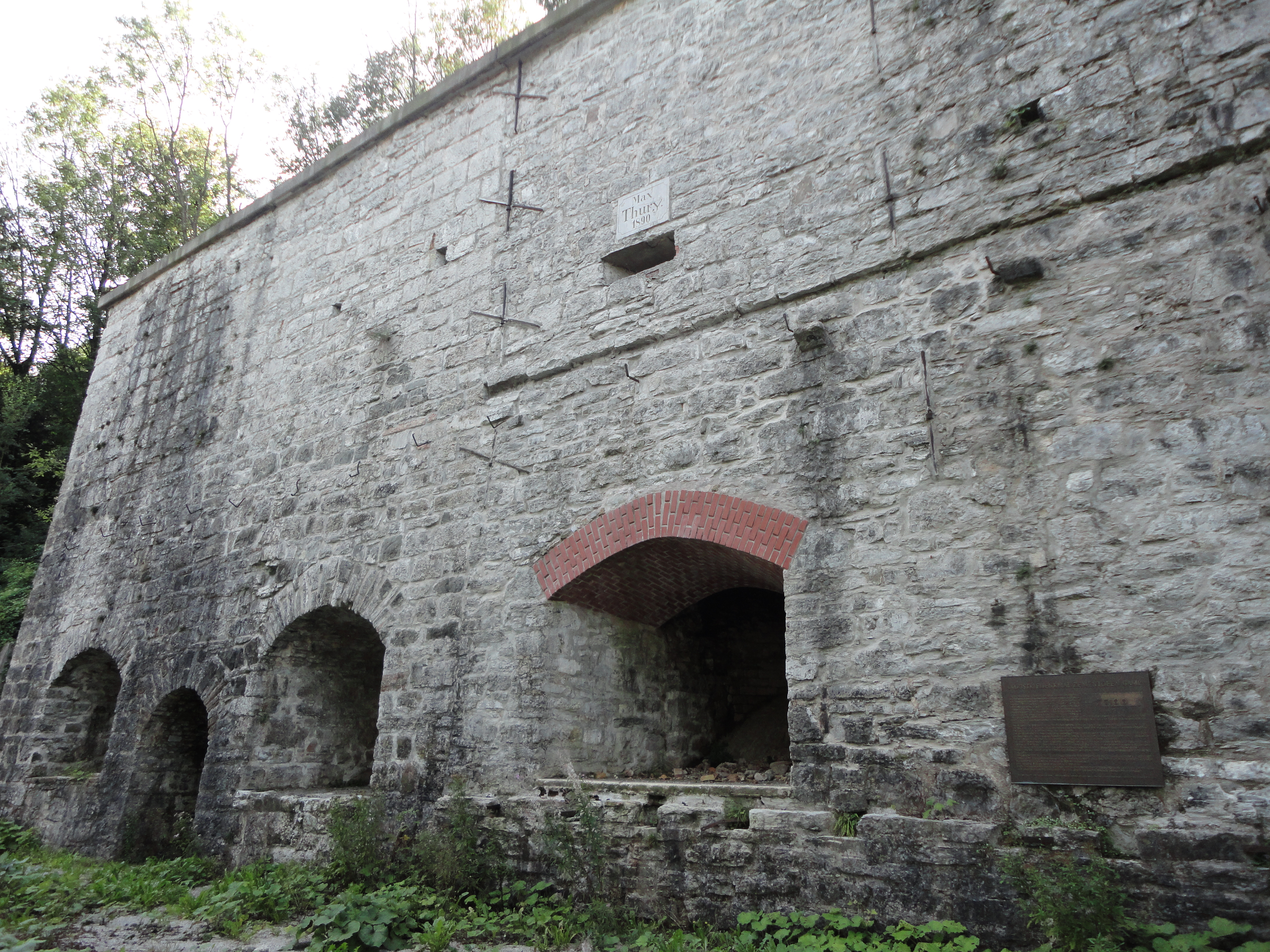 Zementofenanlage in Gamp, Hallein.